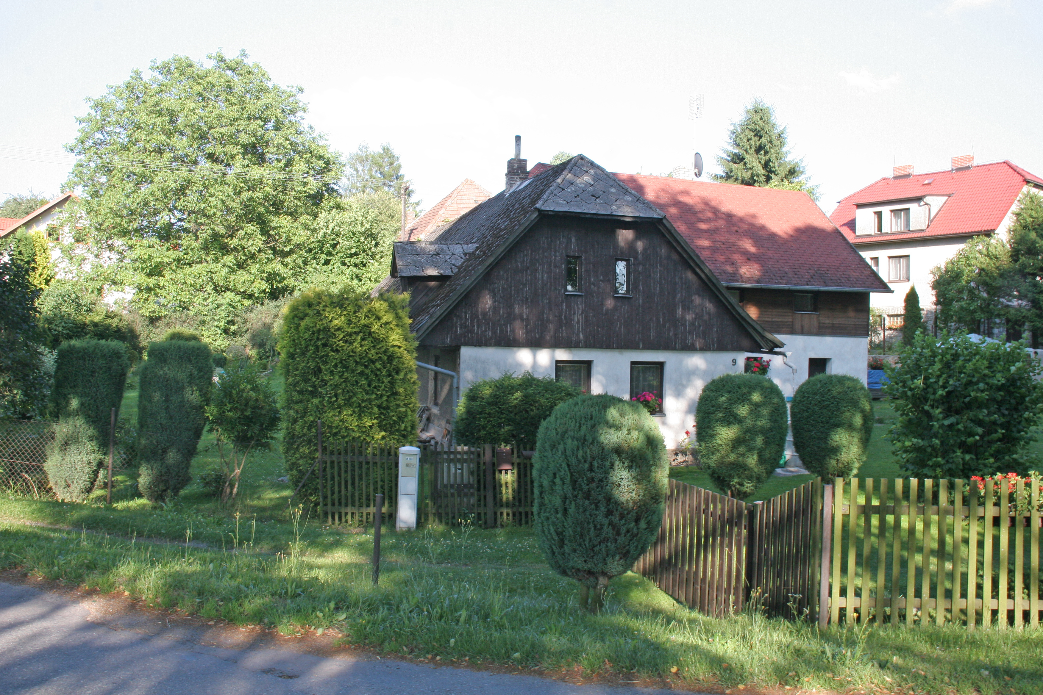 Kovářov čp. 9